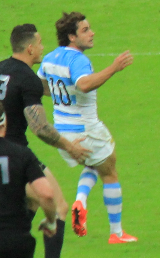 Aerial contest